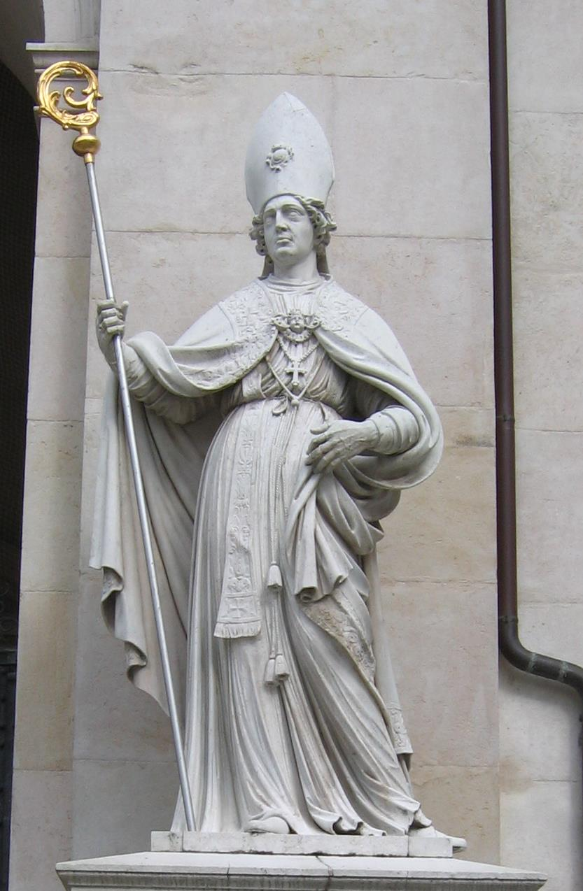 Virgilius